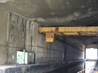 Aufschleppanlage in Kéroman I nach Entfernung des Slips, Zustand Juli 2001